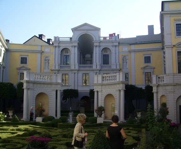 Tessinska palatsets innergård mot söder 2006.